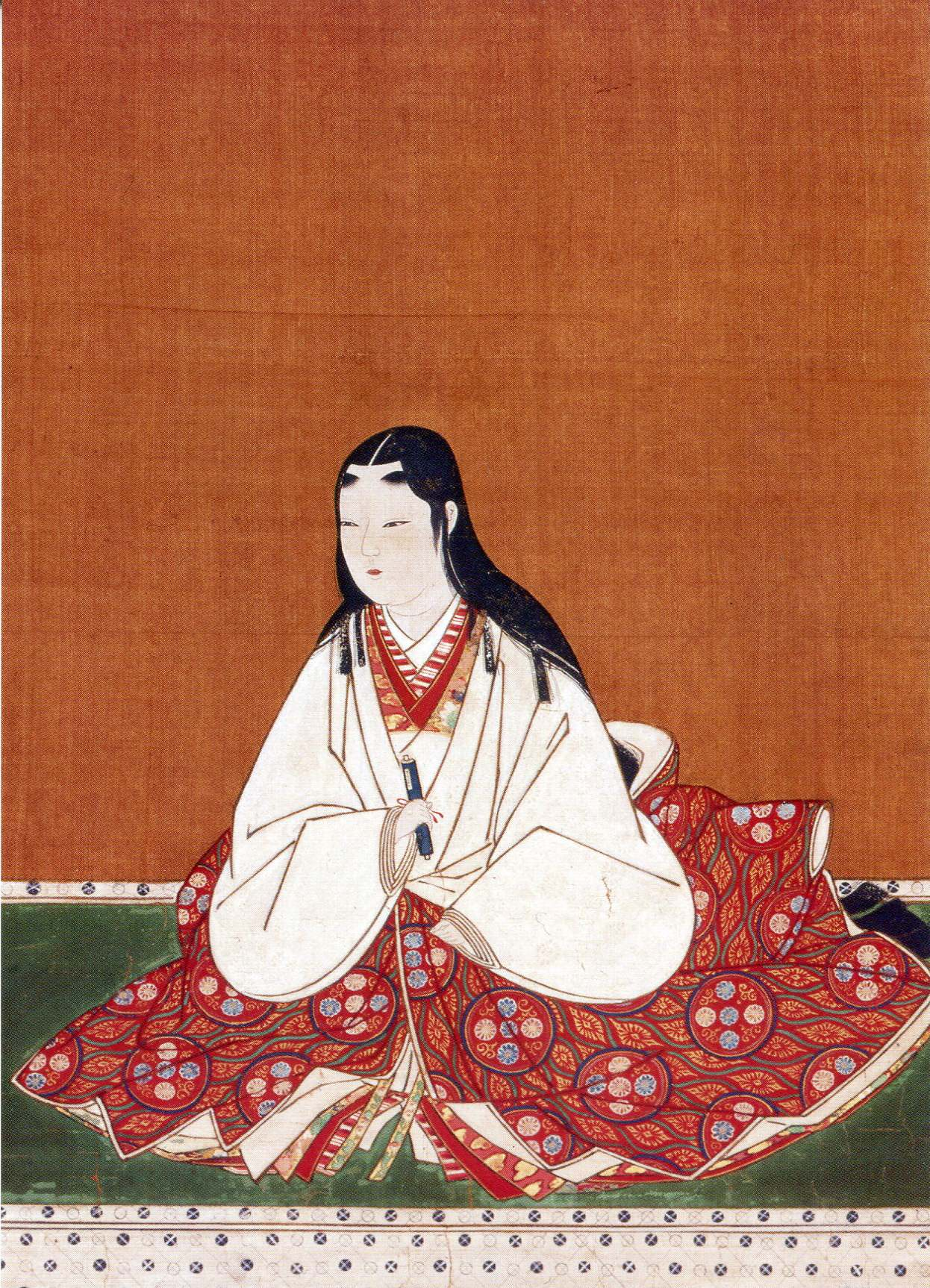 浅井長政夫人（お市の方）の肖像画